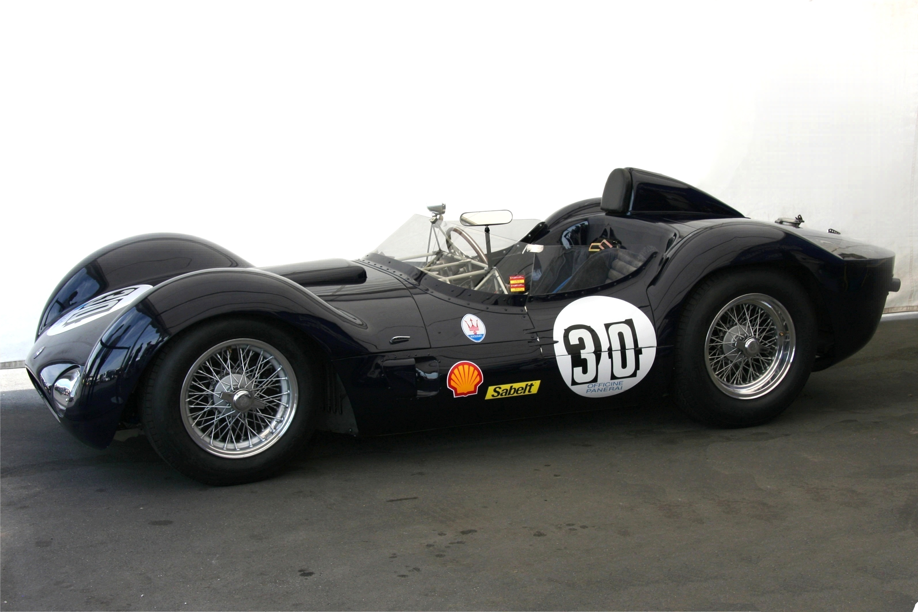 Maserati Tipo 61 – Birdcage, Baujahr 1960 (AvD Oldtimer-Grand-Prix)